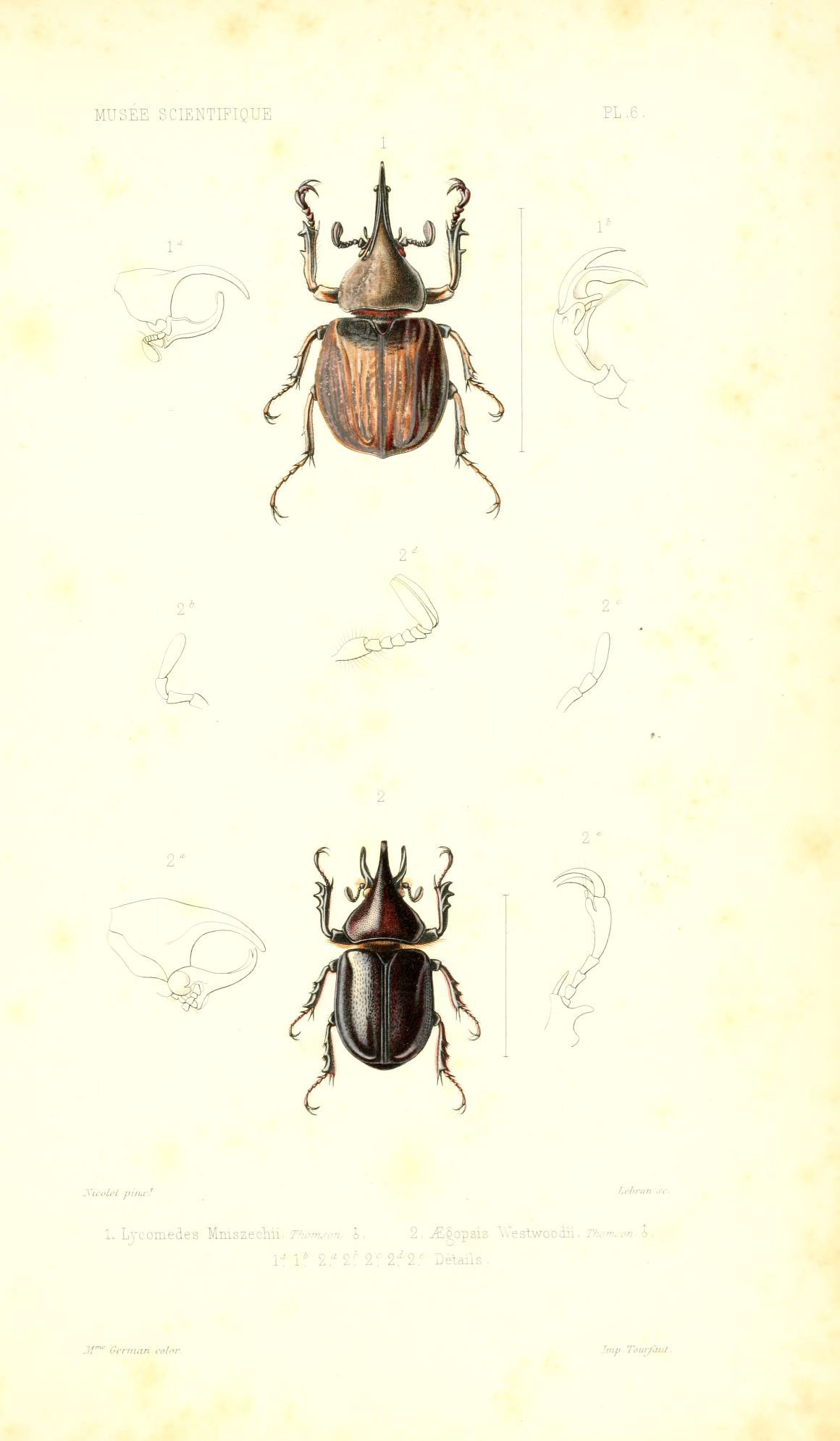 MUSEE SCIENTIFIQUE PL ,6 2* L Lvcomedes Mmazeclaii 7"^wj-ot, î. 2. yËê^opsis \i"eslwoodii. r^w-r^ î . !■' 1* 2,2f 2': 2:' 2 5 Dèlaiis . 3Î"^ Gcrrnan col^r Imp Tour/a ut .